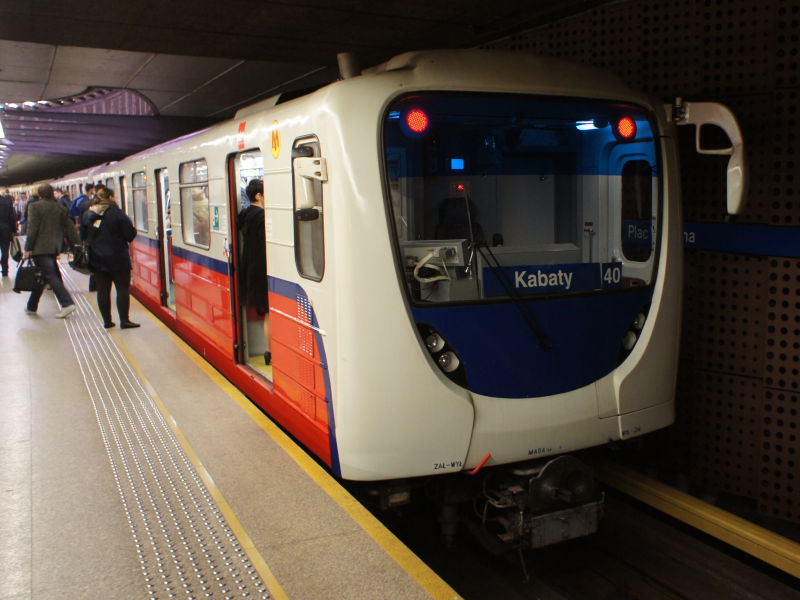 81-572.2/573.2 (pociąg nr 40) stoi na stacji A18 Plac Wilsona.